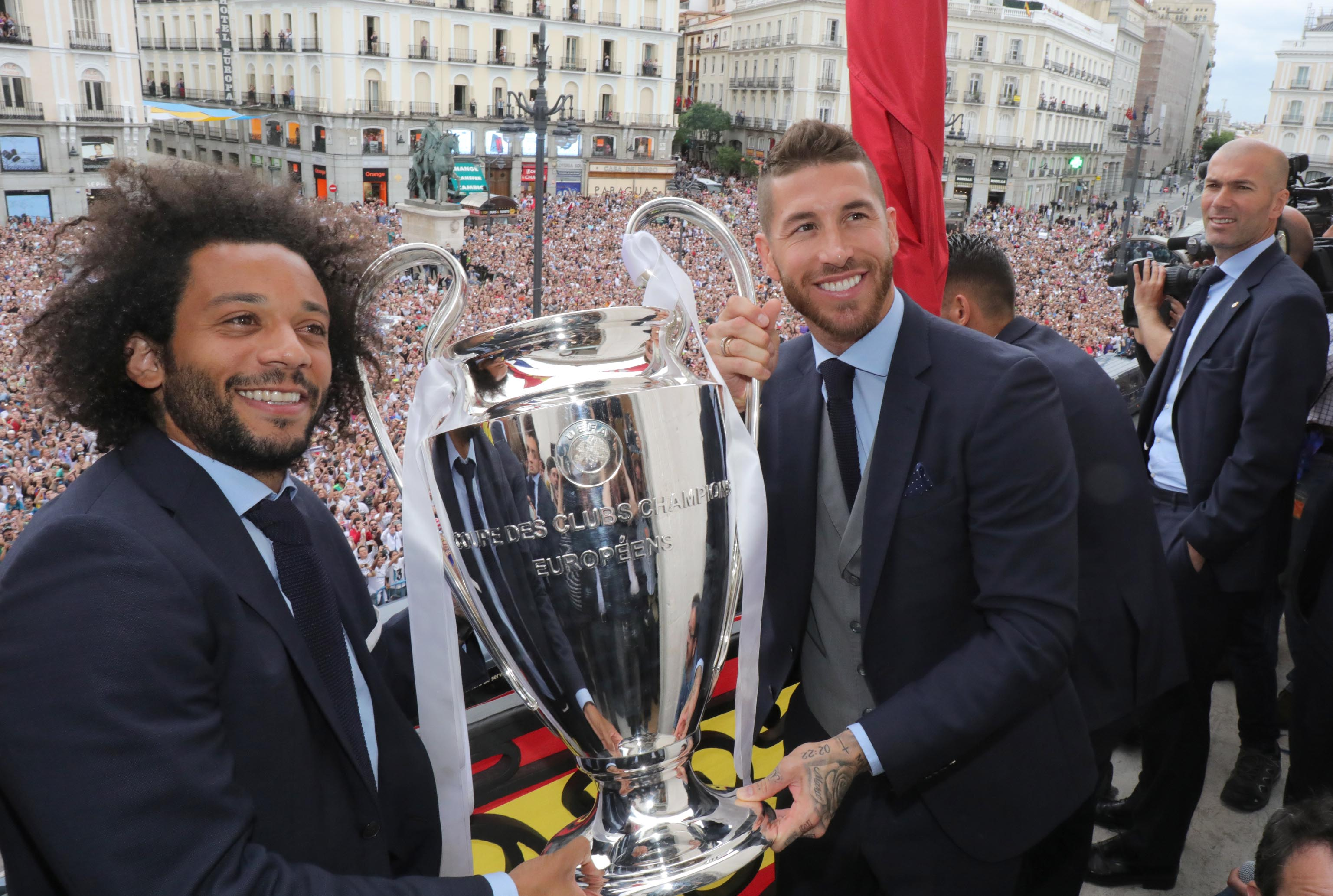 Recepción Real Madrid en la Comunidad de Madrid